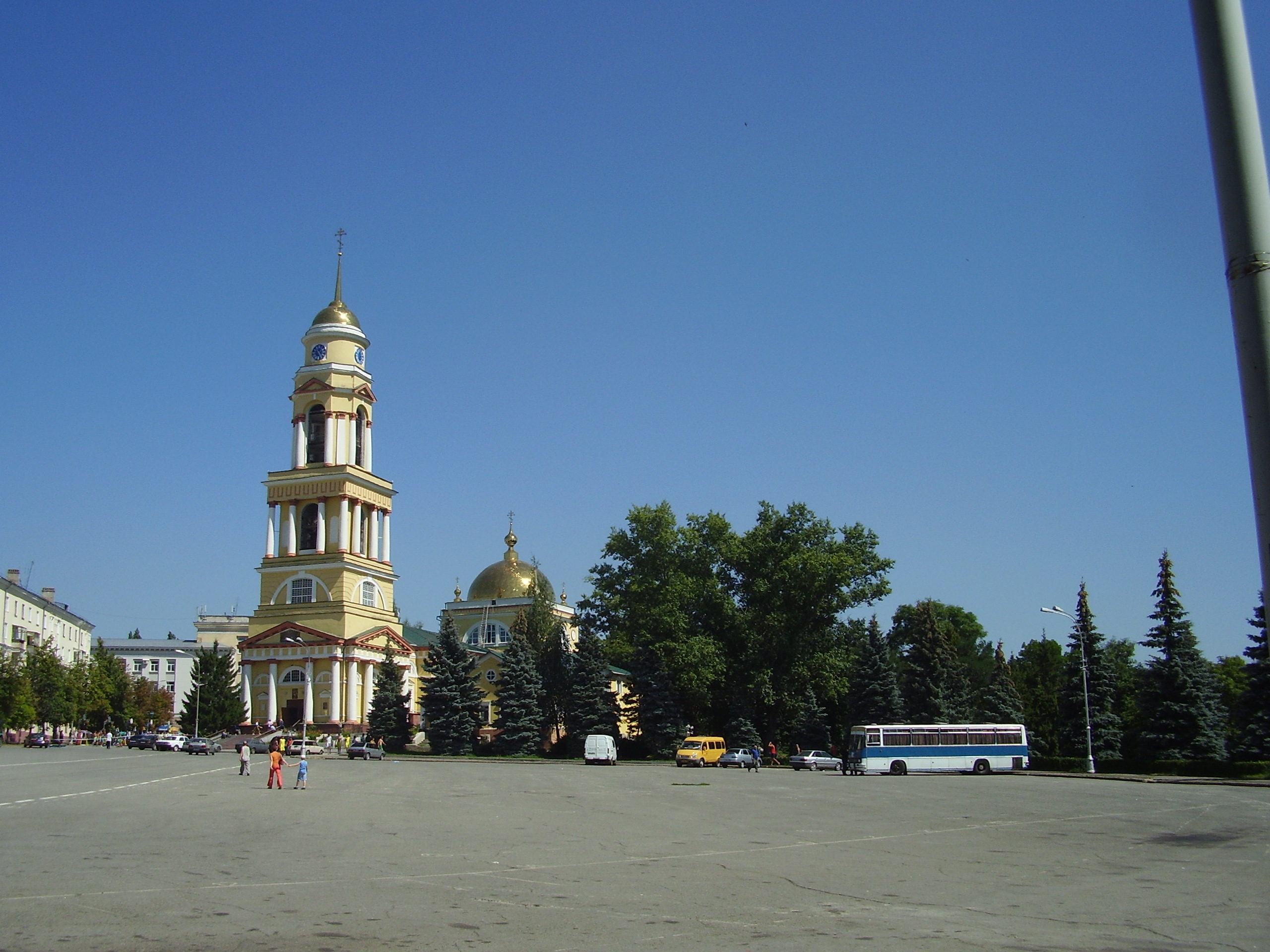 Липецк,Соборная площадь